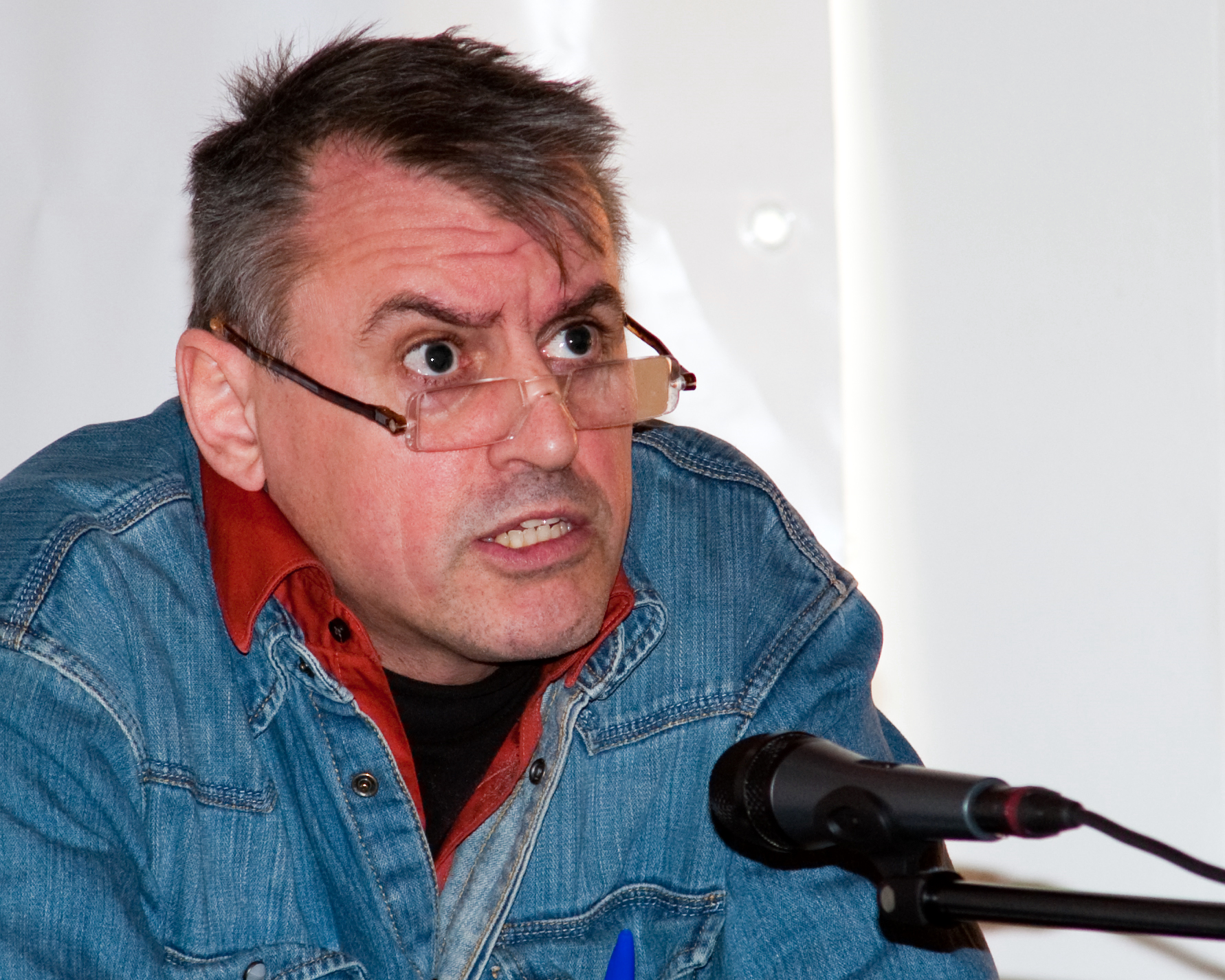 AMSTERDAM - Op zondagmiddag 21 maart was er een actie op de Dam in Amsterdam ter viering van de internationale dag tegen racisme van de Verenigde Naties. Daarvoor was er een bijeenkomst en debat in de Nieuwe Kerk. De sprekers waren o.a. Hedy D' Ancona, Mohammed Rabbae, René Danen en Volkskrant journalist Thomas von der Dunk. In heel Europa zijn rond 21 maart activiteiten in het kader van de International Day for the Elimination of All Forms of Racial Discrimination van de Verenigde Naties. De stichting Nederland Bekent Kleur organiseert sinds 1992 in ons land activiteiten rond de VN-dag.